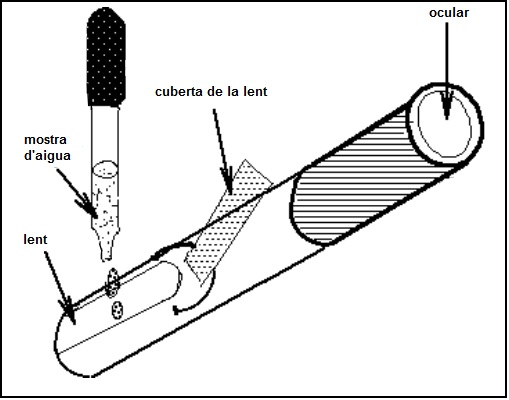 Esquema de un refractòmetre manual